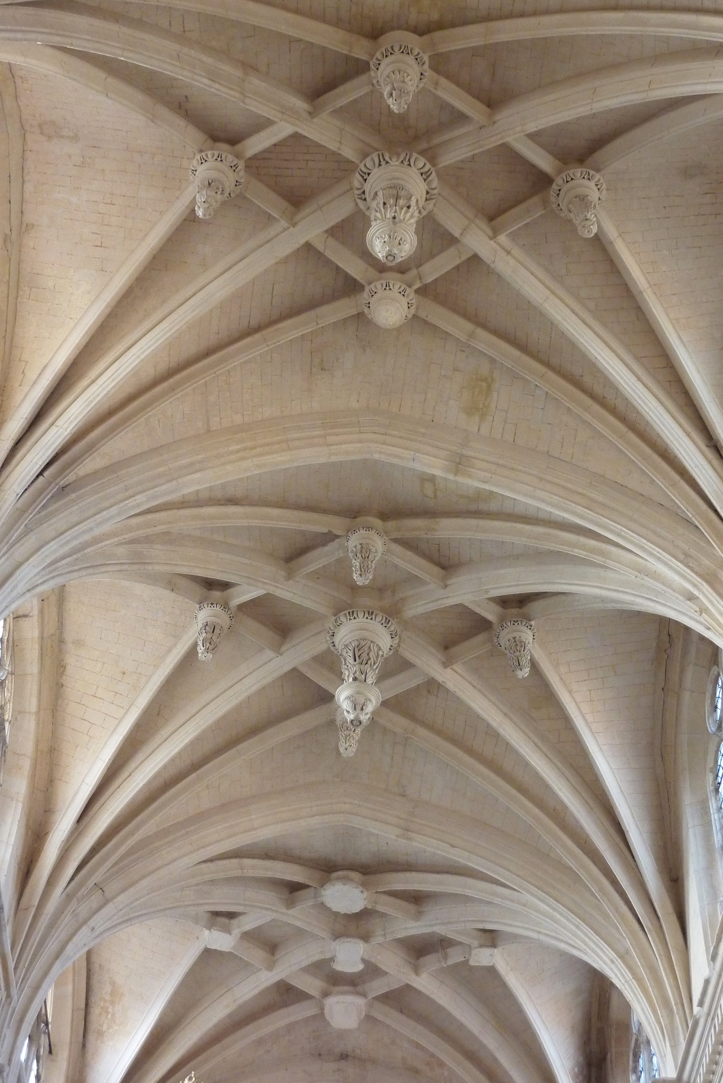 Kirche Saint-Didier in Villiers-le-Bel